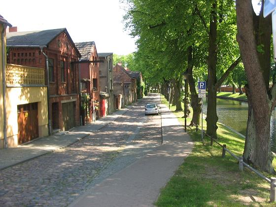 Straße "Am Wandrahmen" und Stepenitz in Perleberg, Brandenburg fotografiert im Mai 2005 von Lienhard Schulz